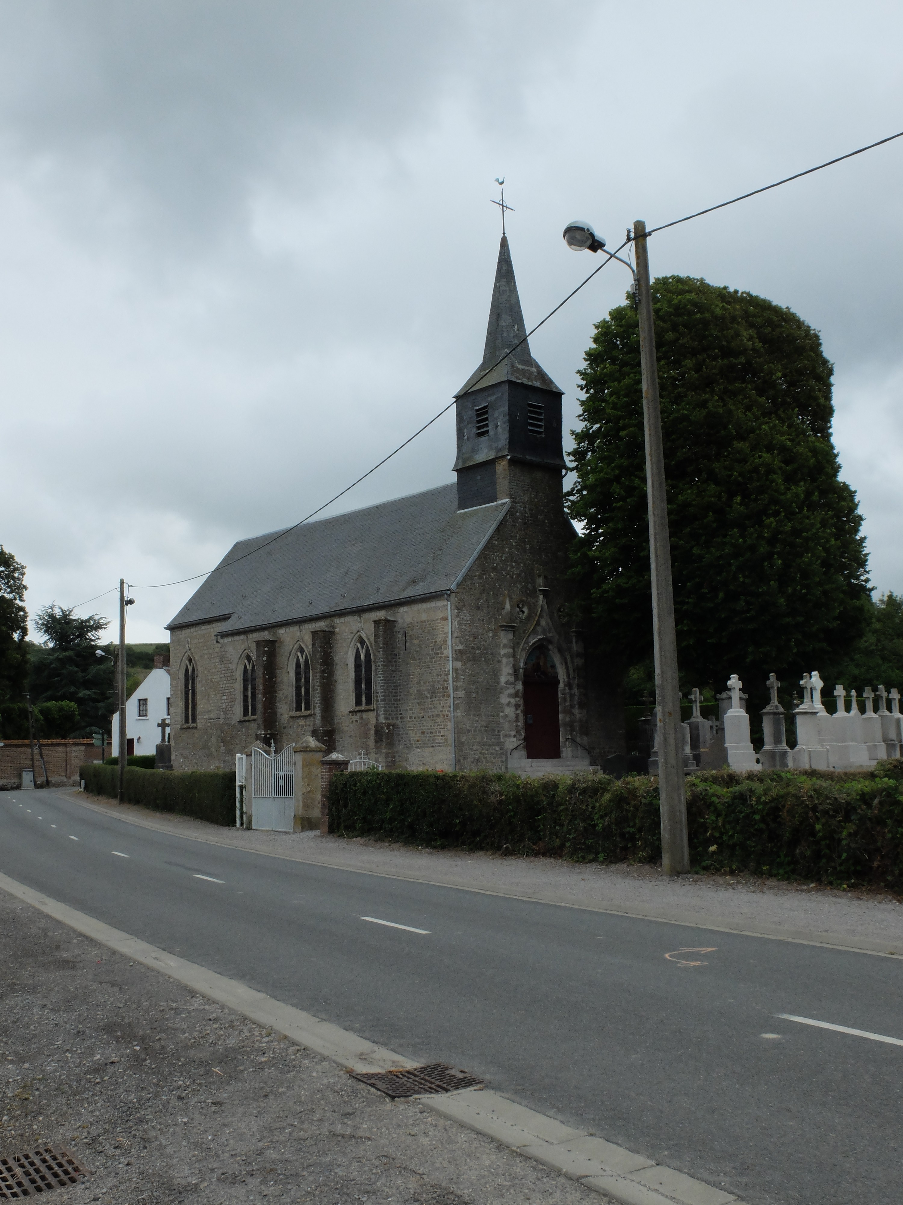 Vue de l'église Saint-Lambert de Boursin (Pas-de-Calais).